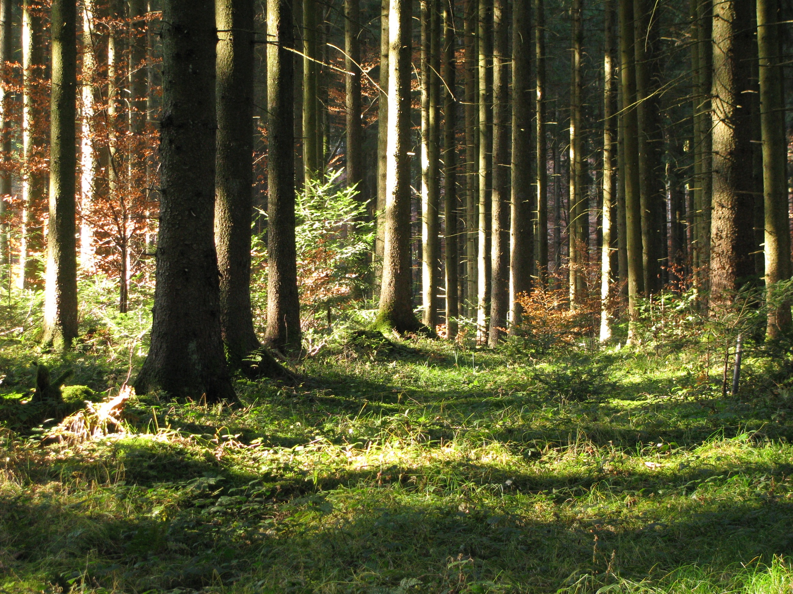 Zeller Wald in der Nähe des „Schwarzen Kreuzes“